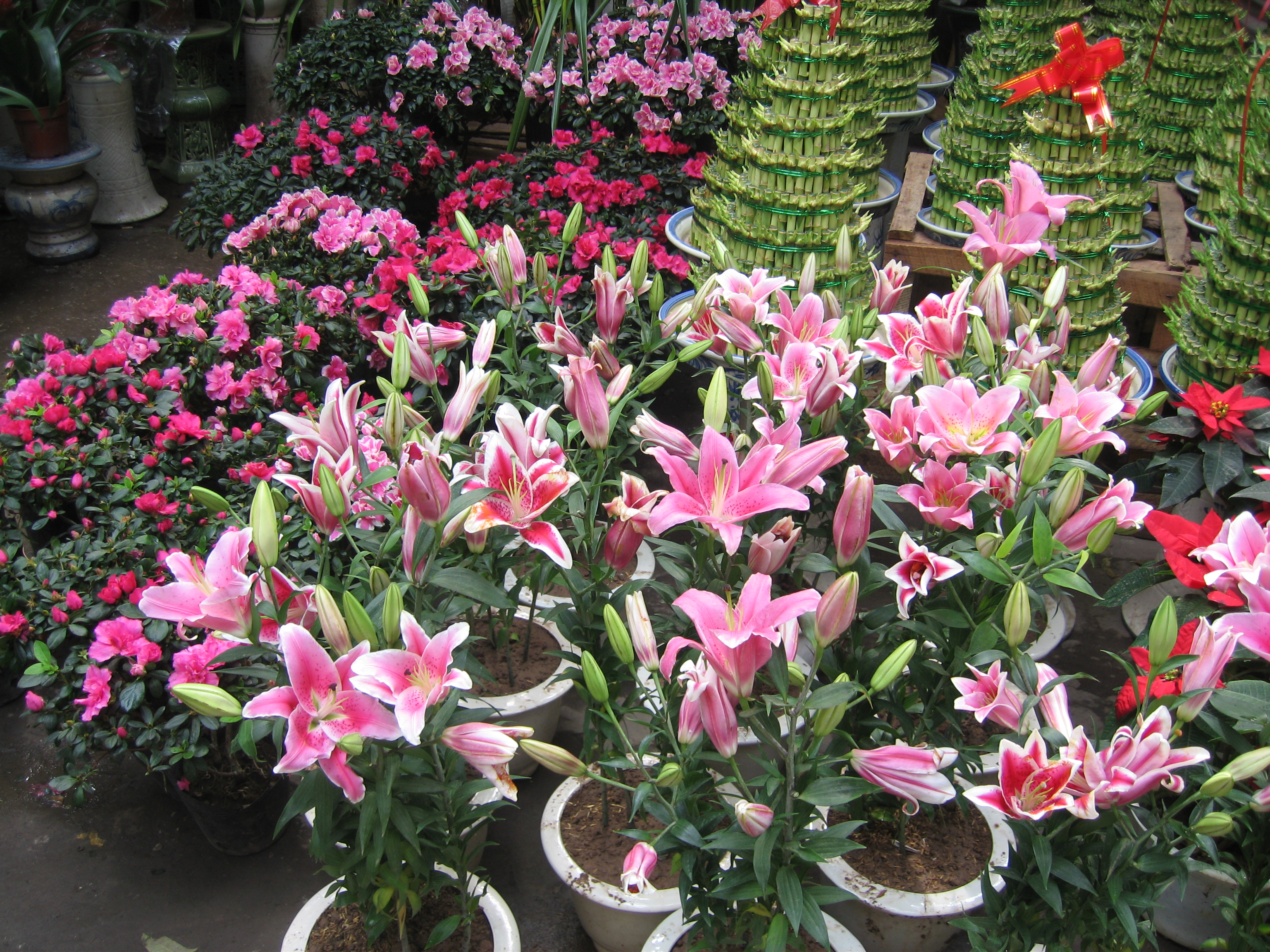 Hình do người truyền lên chụp.